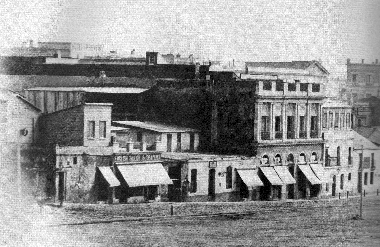 Vista de la calle "Paseo de Julio" (más tarde Leandro N. Alem), en Buenos Aires.